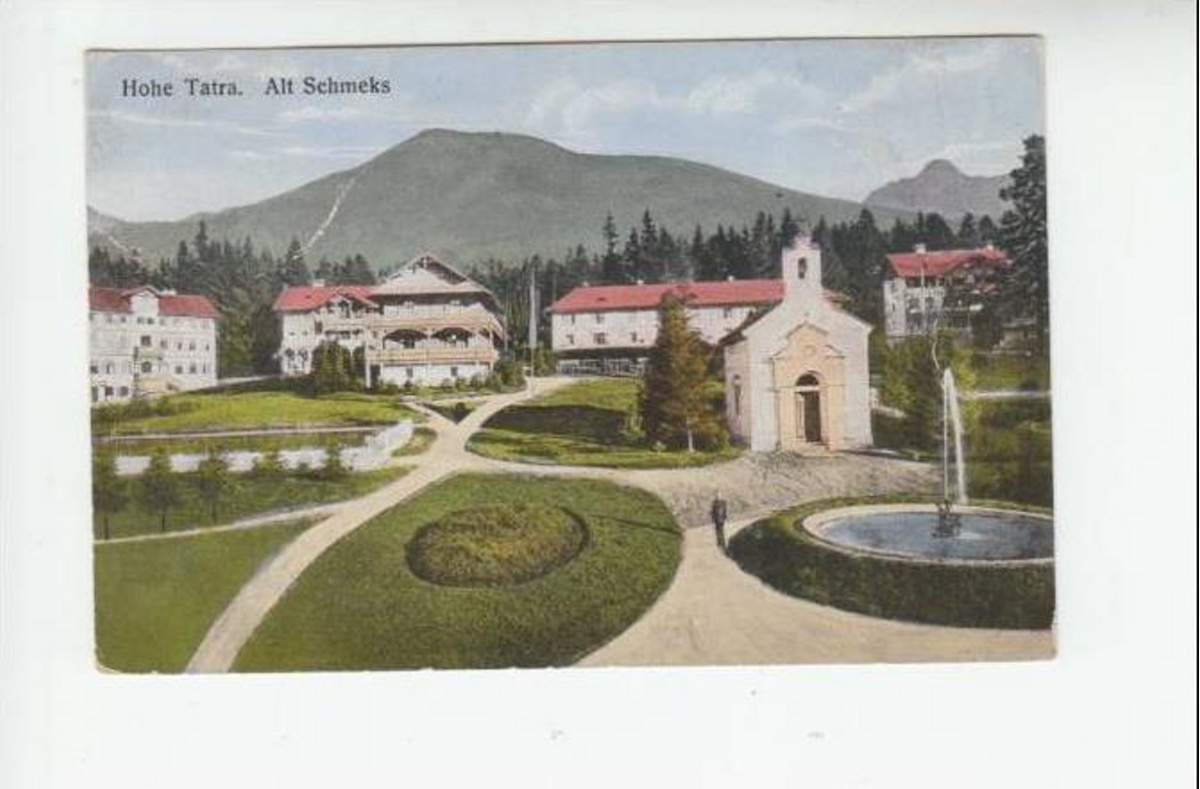 Kaplnka